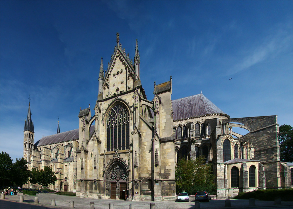 Basilique Saint-Remi, Reims, Champagne-Ardenne, France. Portail transept sud.